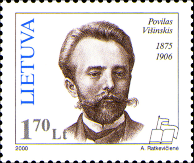 Povilas Višinskis